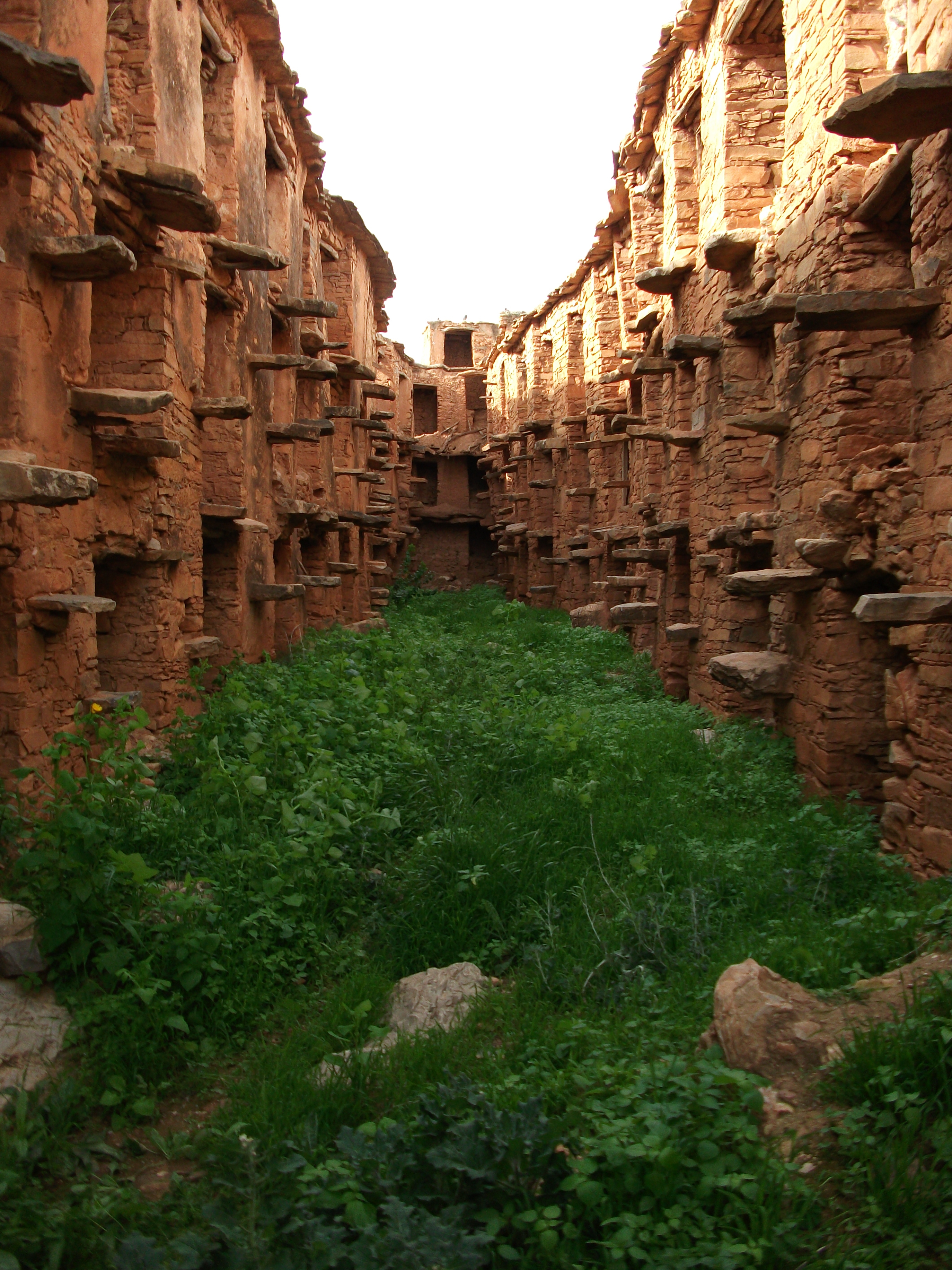 Agadir Imi'm Korn (Gang)